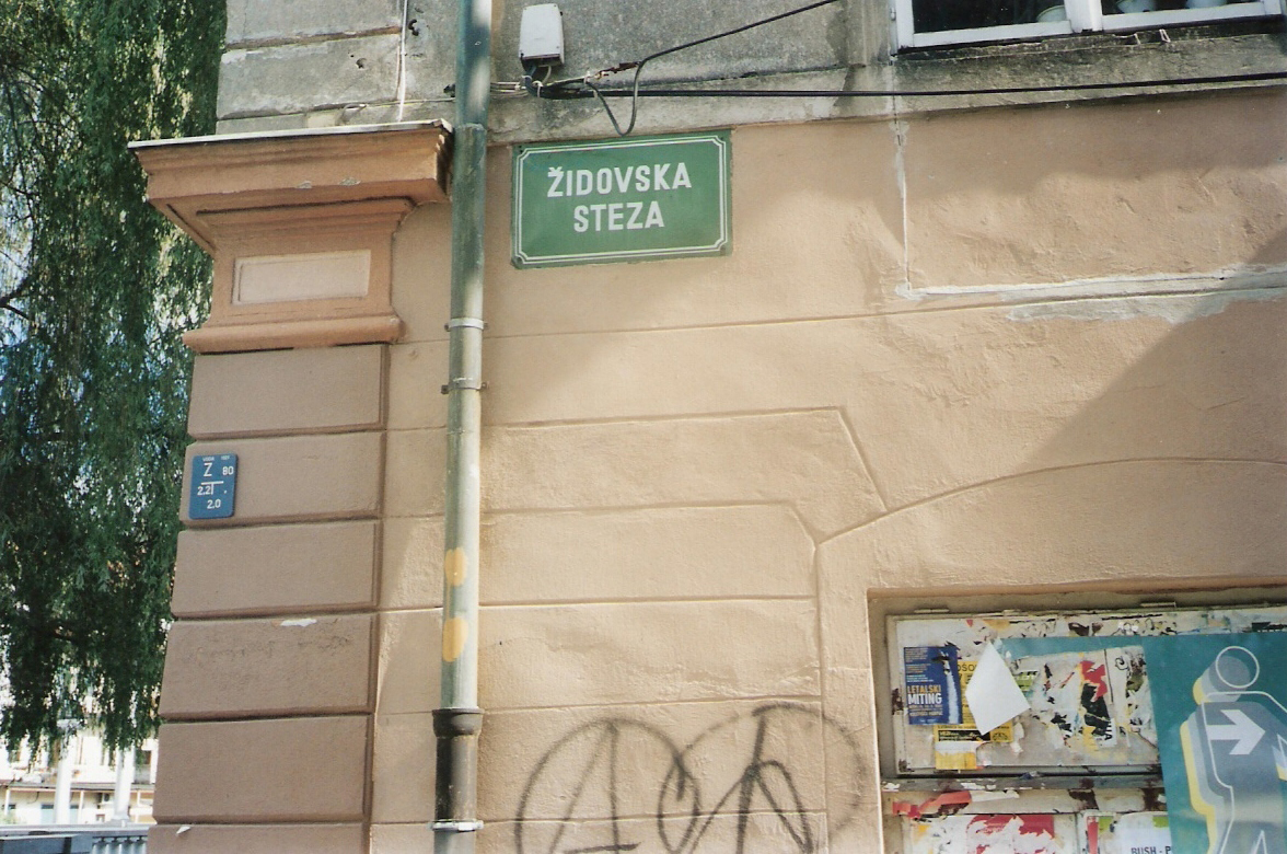 jewish street, ljubliana, slovenia